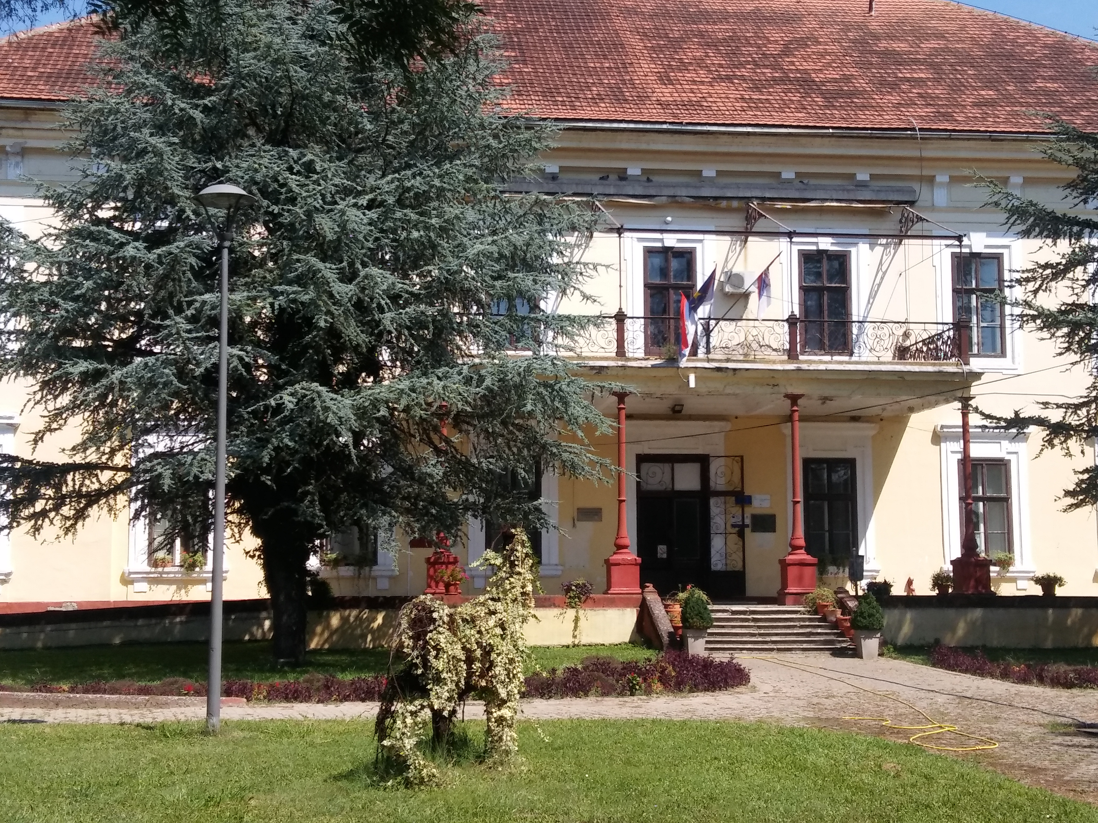 Српски (ћирилица): Пољопривредна школа са домом ученика у Футогу